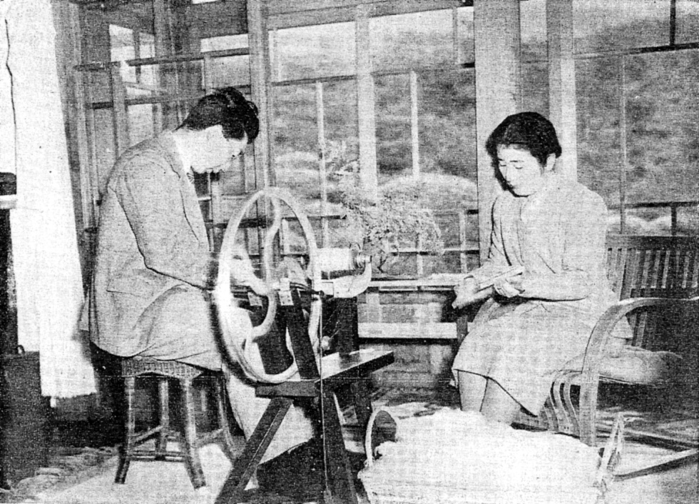 糸車(Spinning wheel)で羊毛(Wool)を紡ぐ秩父宮夫妻。